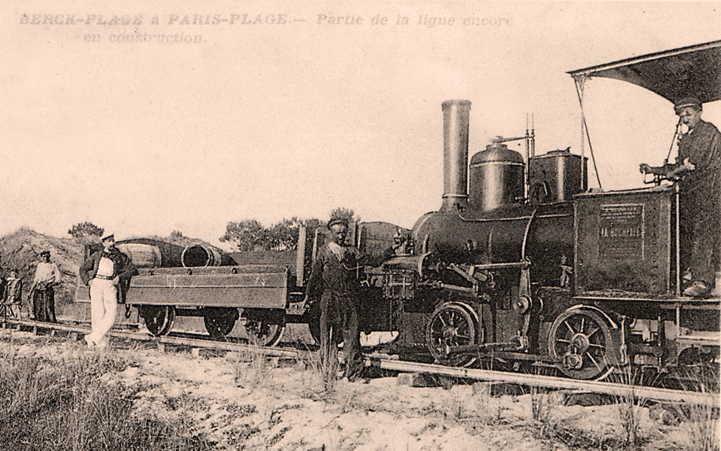 Train de travaux, locomotive Corpet de chantier, type 020, distribution "Système Brown", sur le tronçon de ligne Merlimont-Plage - Daloz (Le Touquet) entre 1909 et 1910.